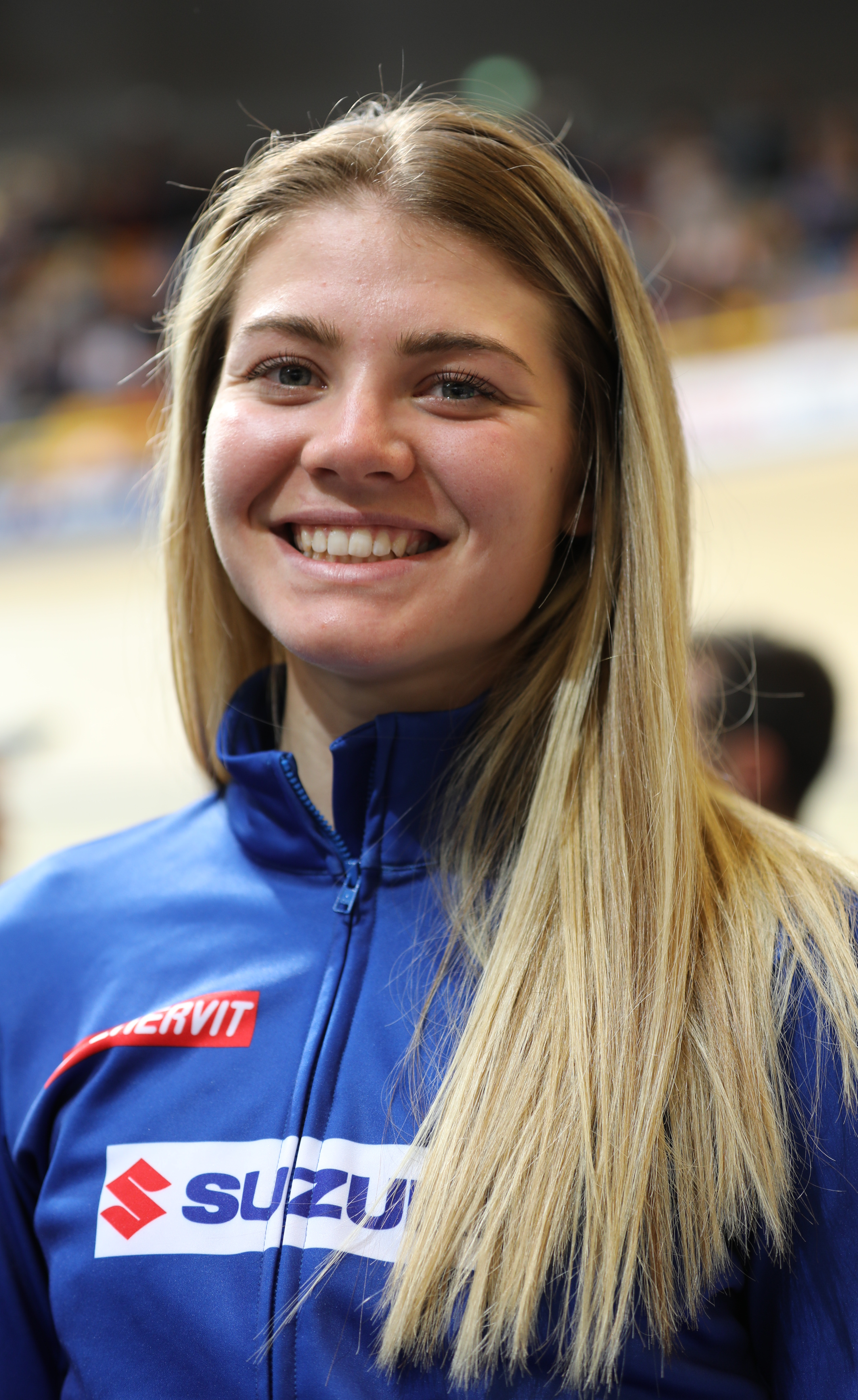 Martina Alzini, ital. Radsportlerin